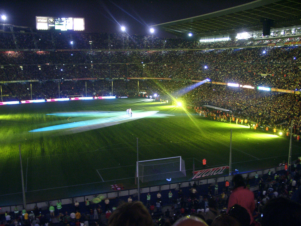 Camp Nou in BarcelonaNit de Champions 2